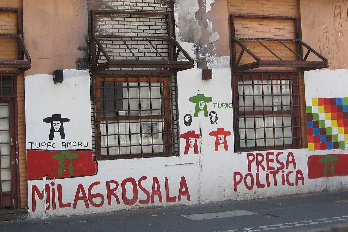 Pintada en un muro en la ciudad de Buenos Aires